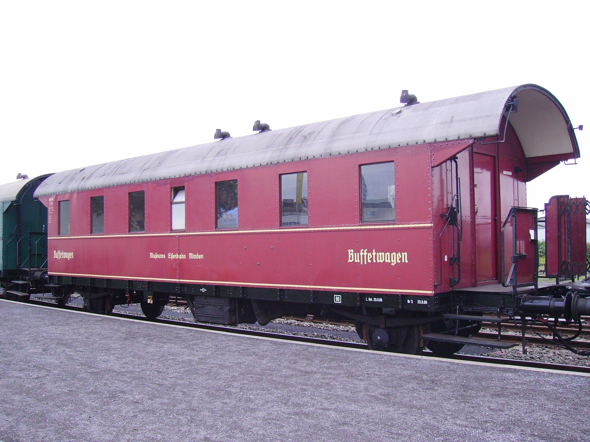 Buffetwagen der Museums-Eisenbahn-Minden (MEM) aus Minden, Nordrhein-Westfalen.